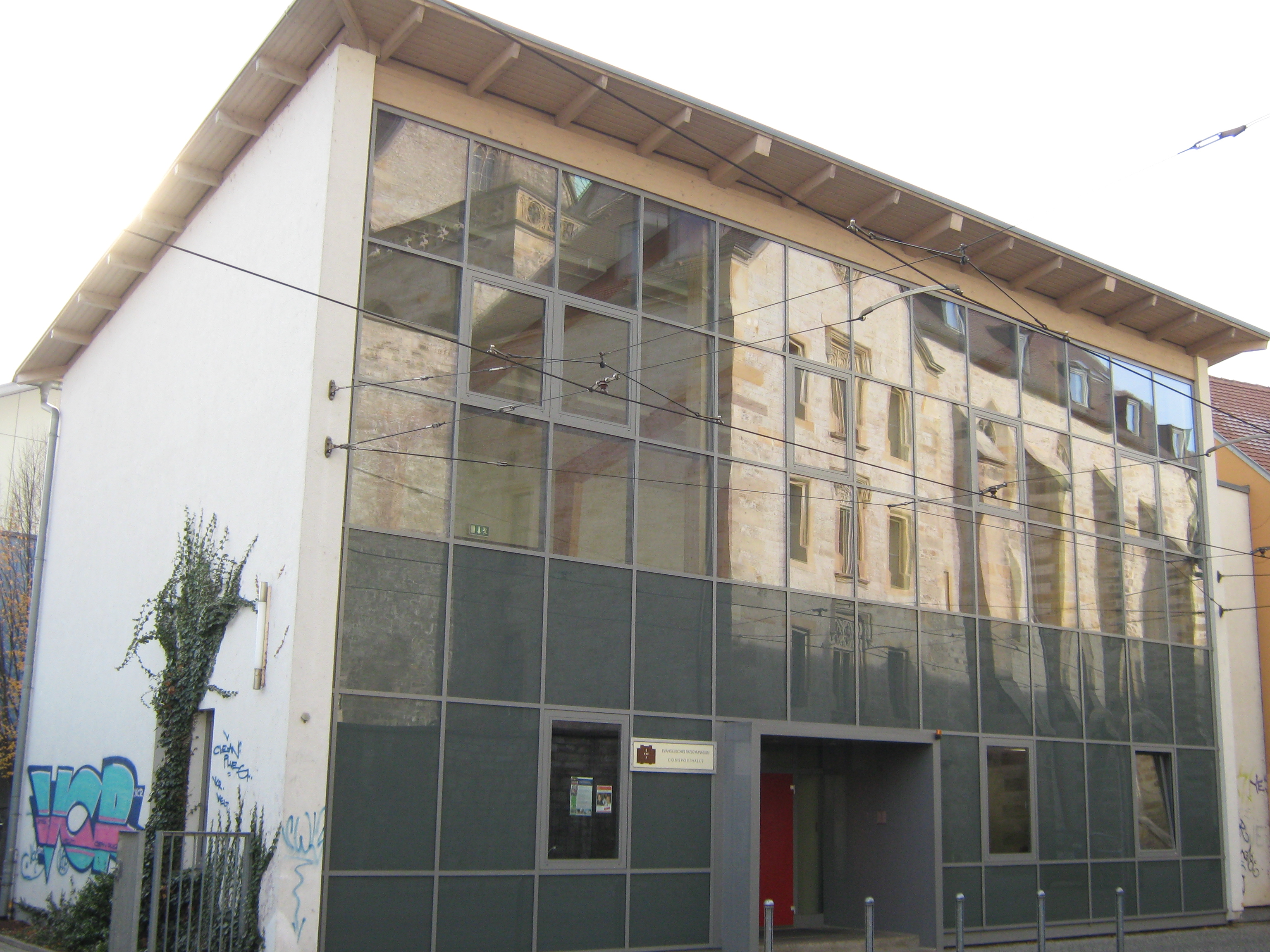 Die Domsporthalle in der Altstadt von Erfurt (Deutschland), Neubau 1999.